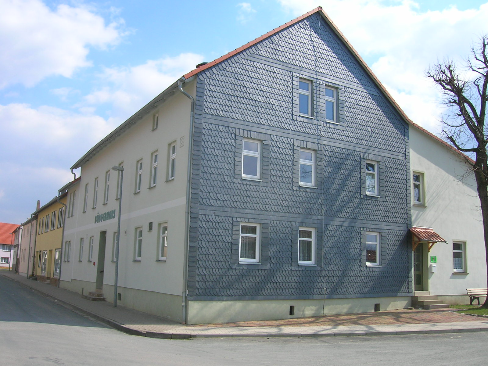 Bürgerhaus von Sülzenbrücken in der Wachsenburggemeinde/Thüringen